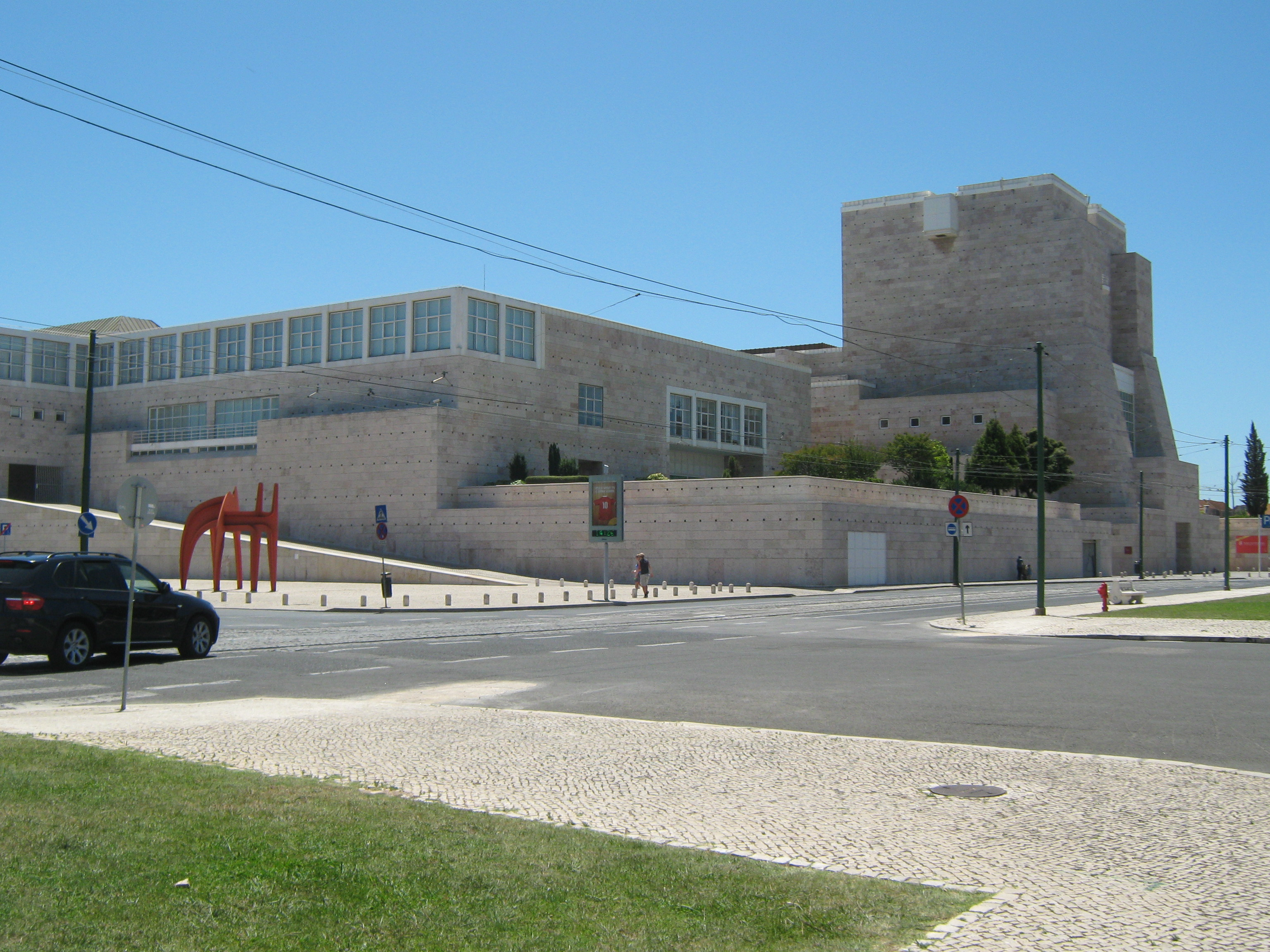 Centro Cultural de Belém